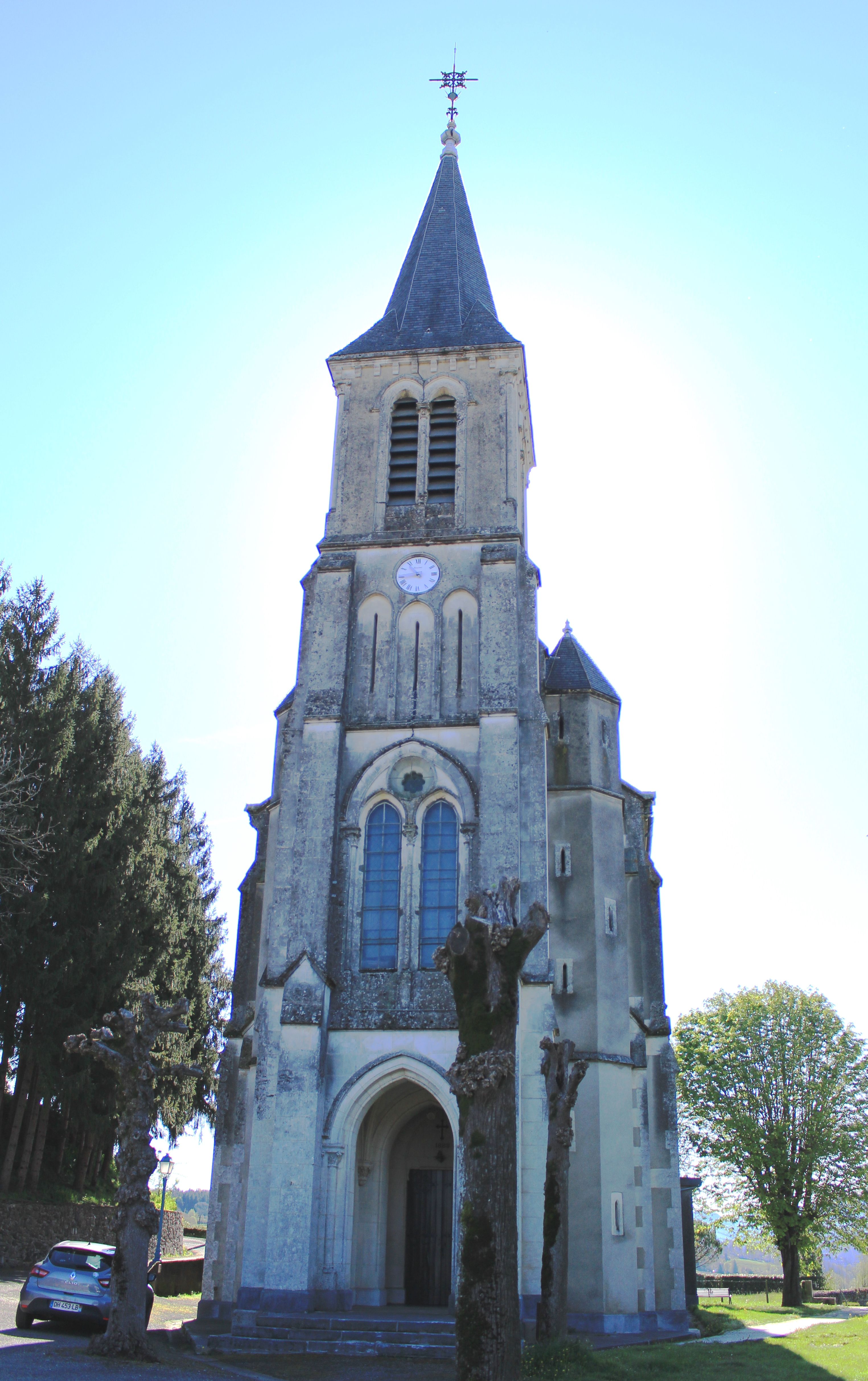 Église Notre-Dame-de-l'Assomption de Poueyferré (Hautes-Pyrénées)